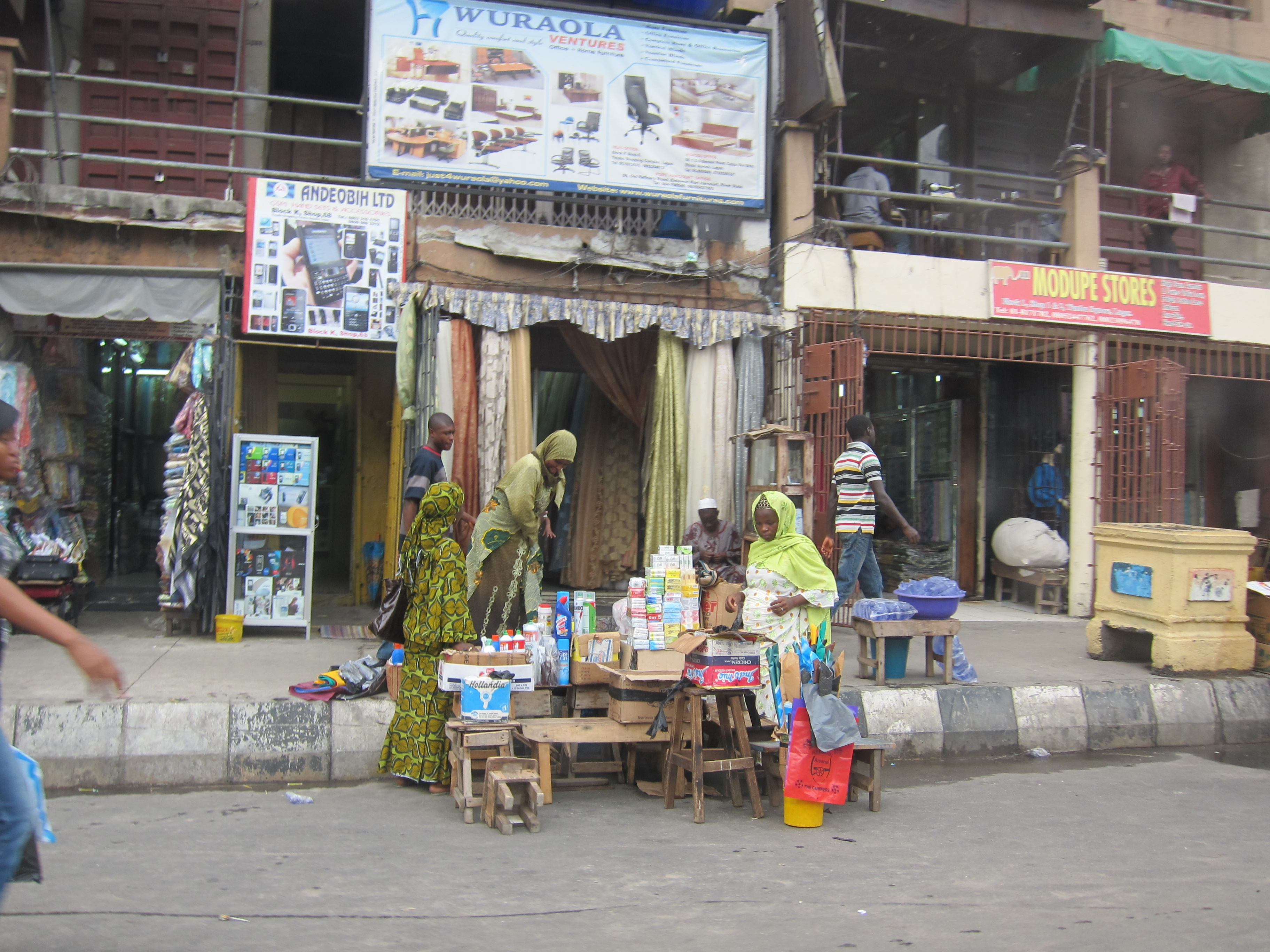 Lagos